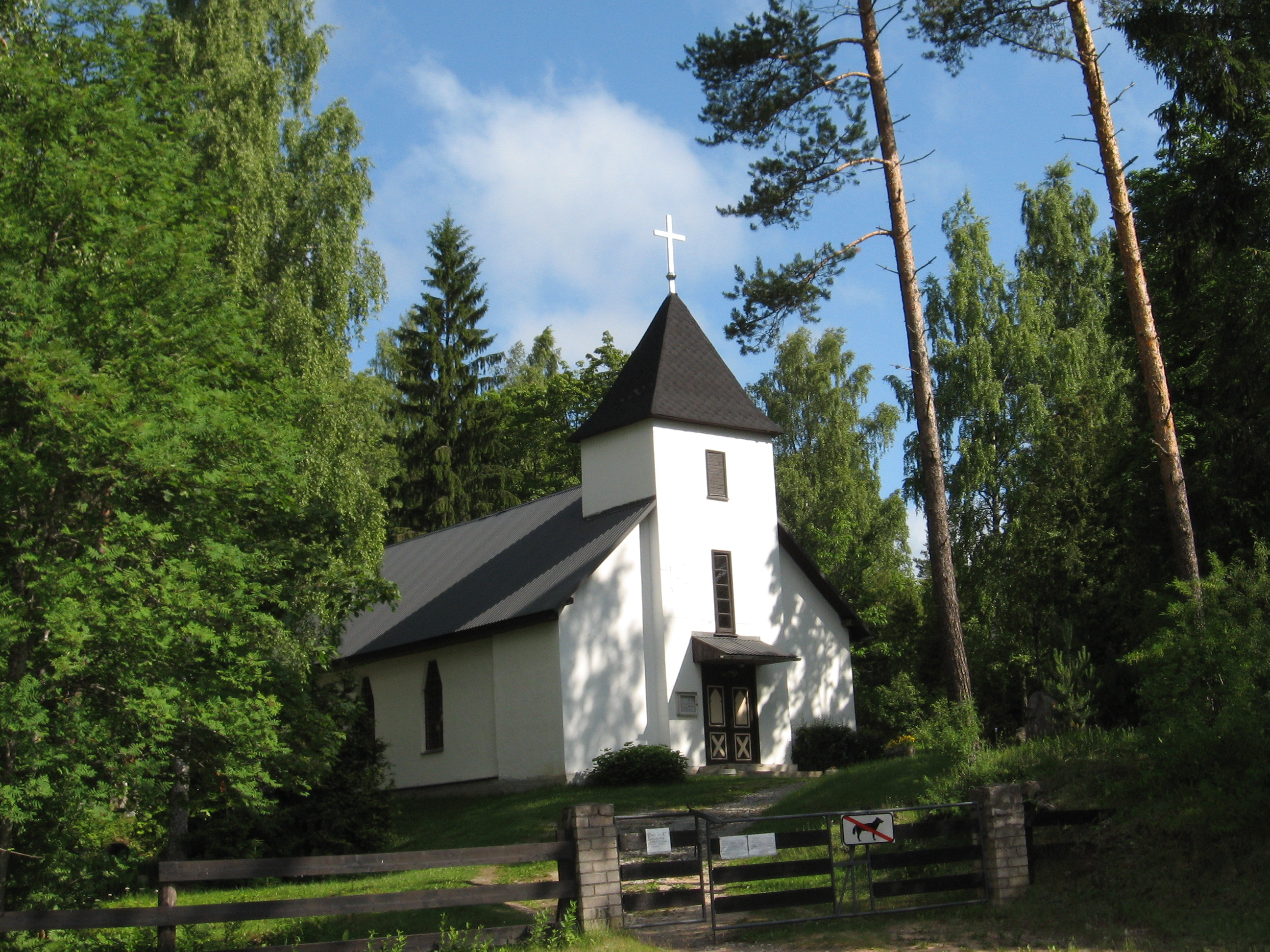 Vaade Aegviidu vana kalmistu sissepääsule